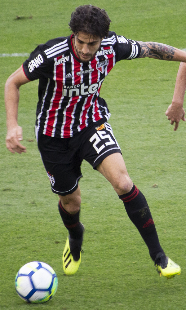 Foto: Douglas Teixeira/Futebol Santista